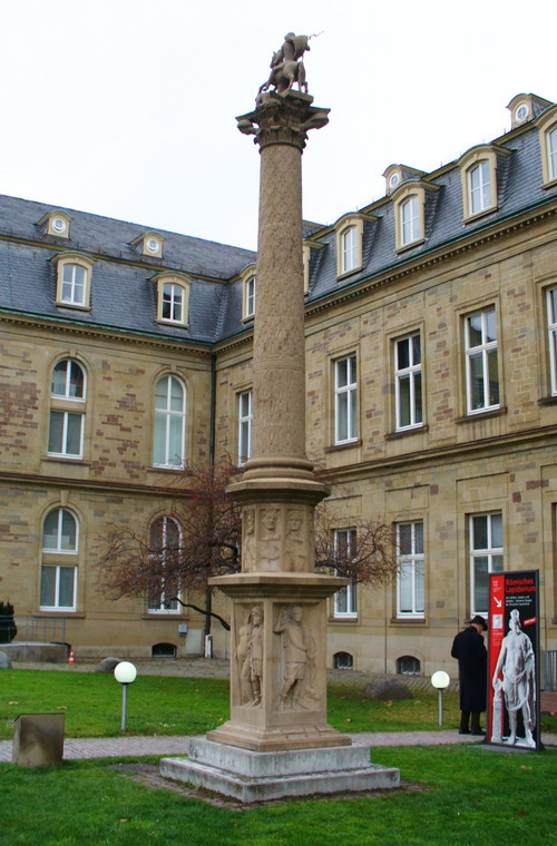 Stuttgart Neues Schloss Jupitergigantensäule - Rekonstruktion der Säule von Hausen a.d.Zaber